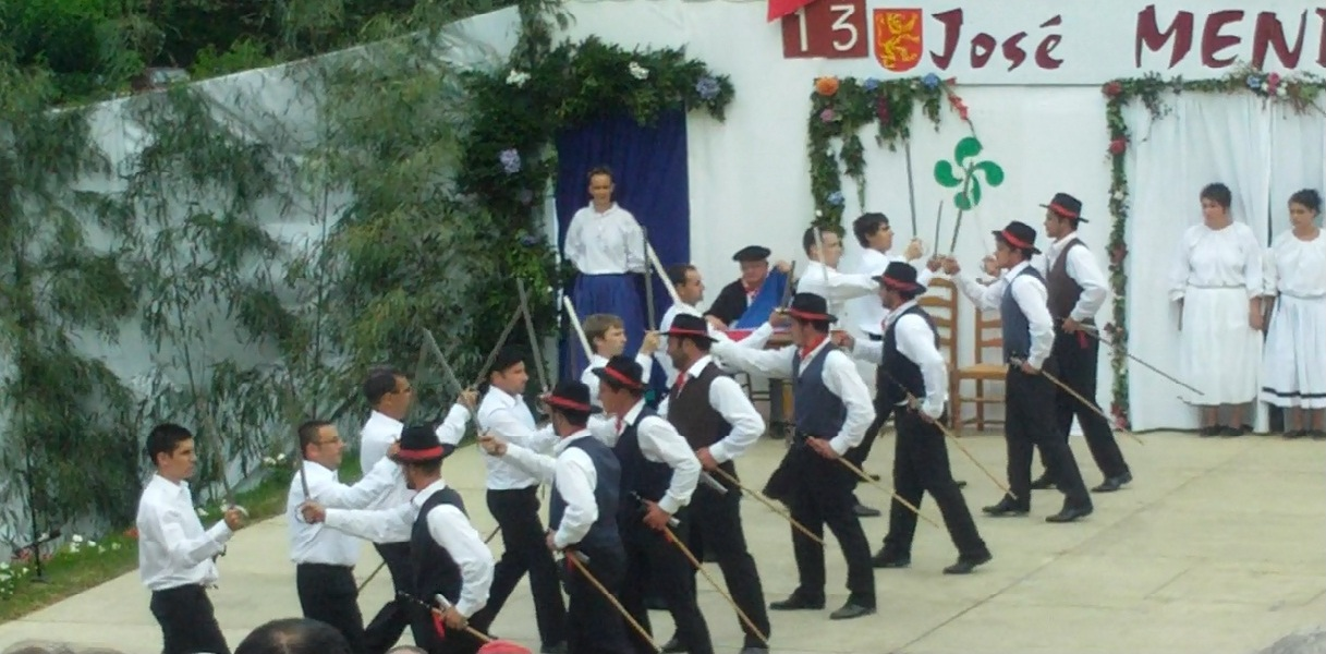 José Mendiague pastoralaren bigarren emanaldia. 2012-VIII-12. Arrokiaga